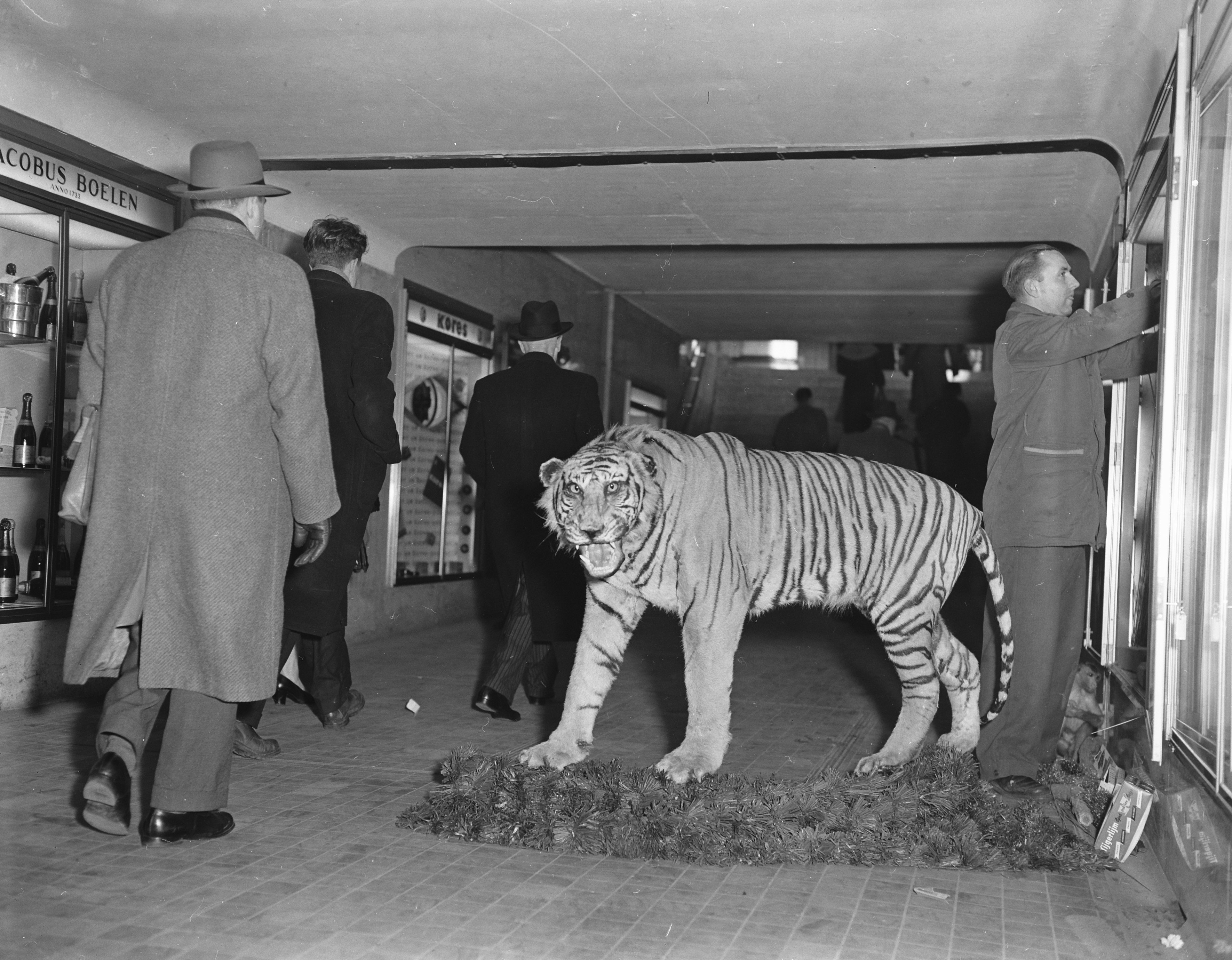 Collectie / Archief : Fotocollectie Anefo Reportage / Serie : [ onbekend ] Beschrijving : Losgebroken tijger in tunnel Centraal Station , gelukkig geen echte tijger Datum : 16 januari 1956 Trefwoorden : TUNNELS, tijgers Fotograaf : Pot, Harry / Anefo Auteursrechthebbende : Nationaal Archief Materiaalsoort : Negatief (zwart/wit) Nummer archiefinventaris : bekijk toegang 2.24.01.04 Bestanddeelnummer : 907-5433